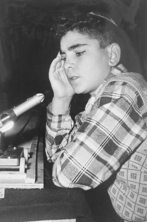 שמעון שטרית, חתן התנך העולמי